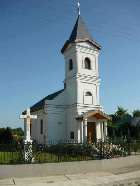 Templom